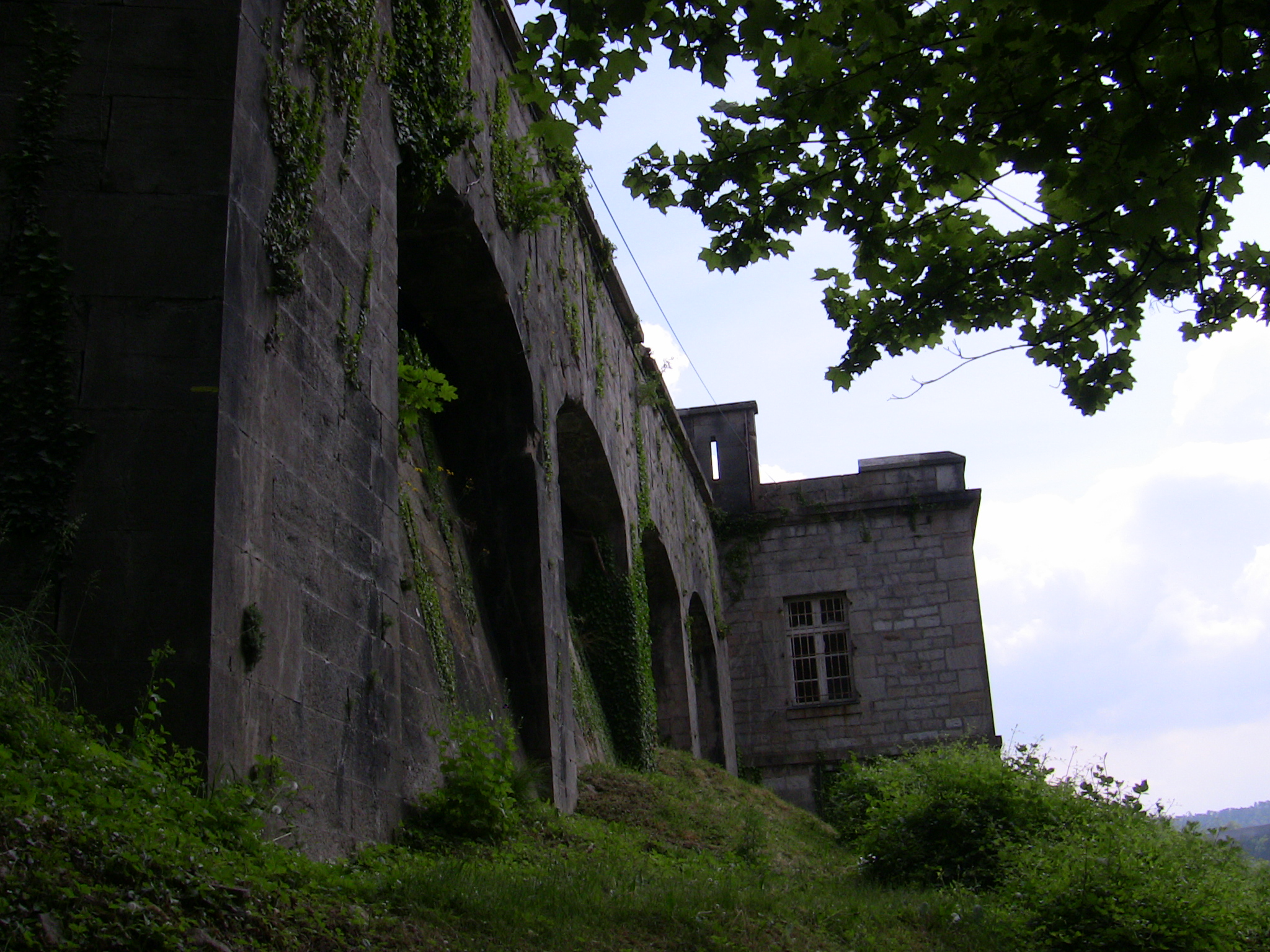 Les remparts ouest du fort de Beauregard, à Besançon (Doubs, France).